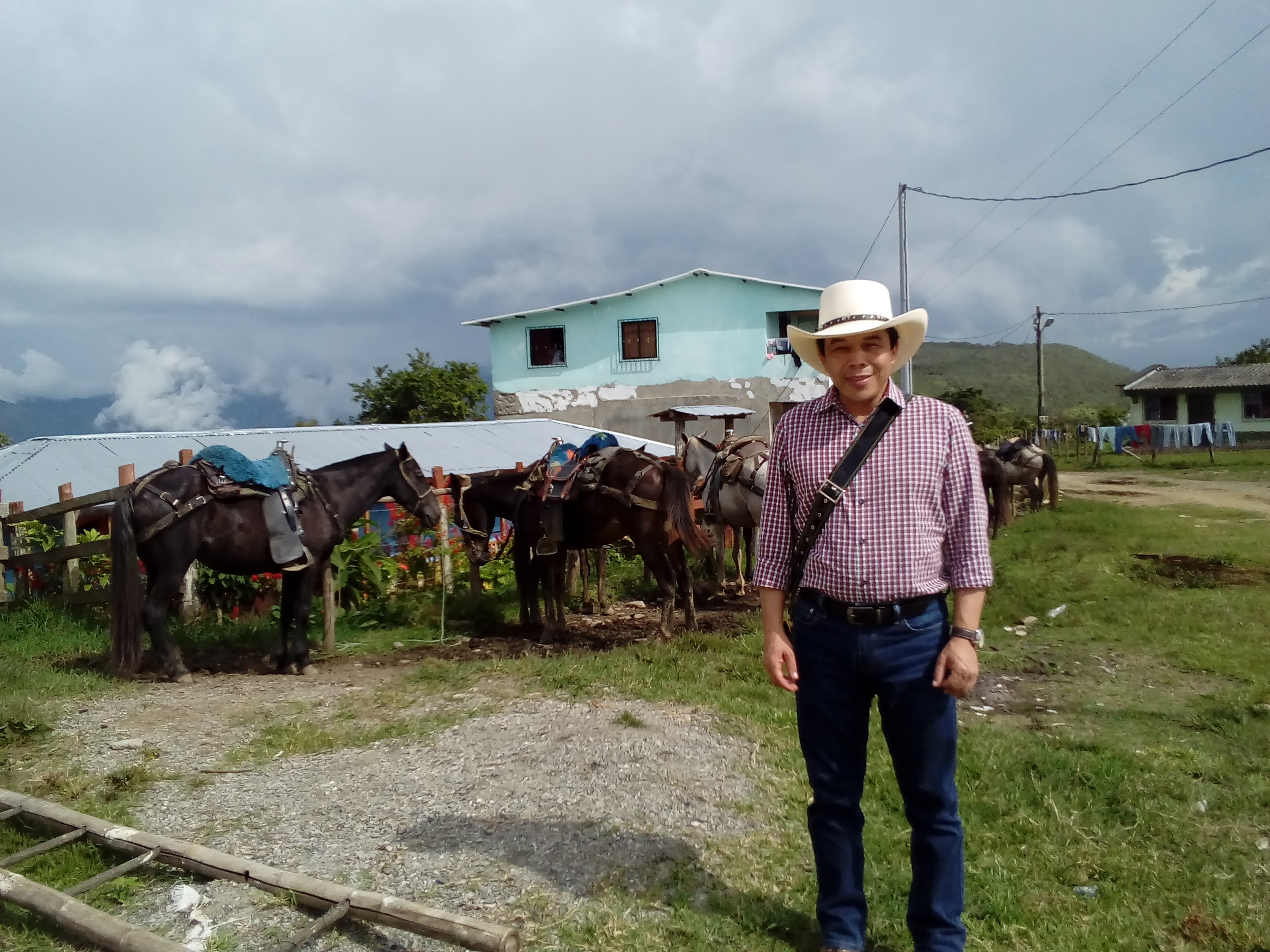 OSCAR HURTADO FOTOS REPRESENTANTE (1)